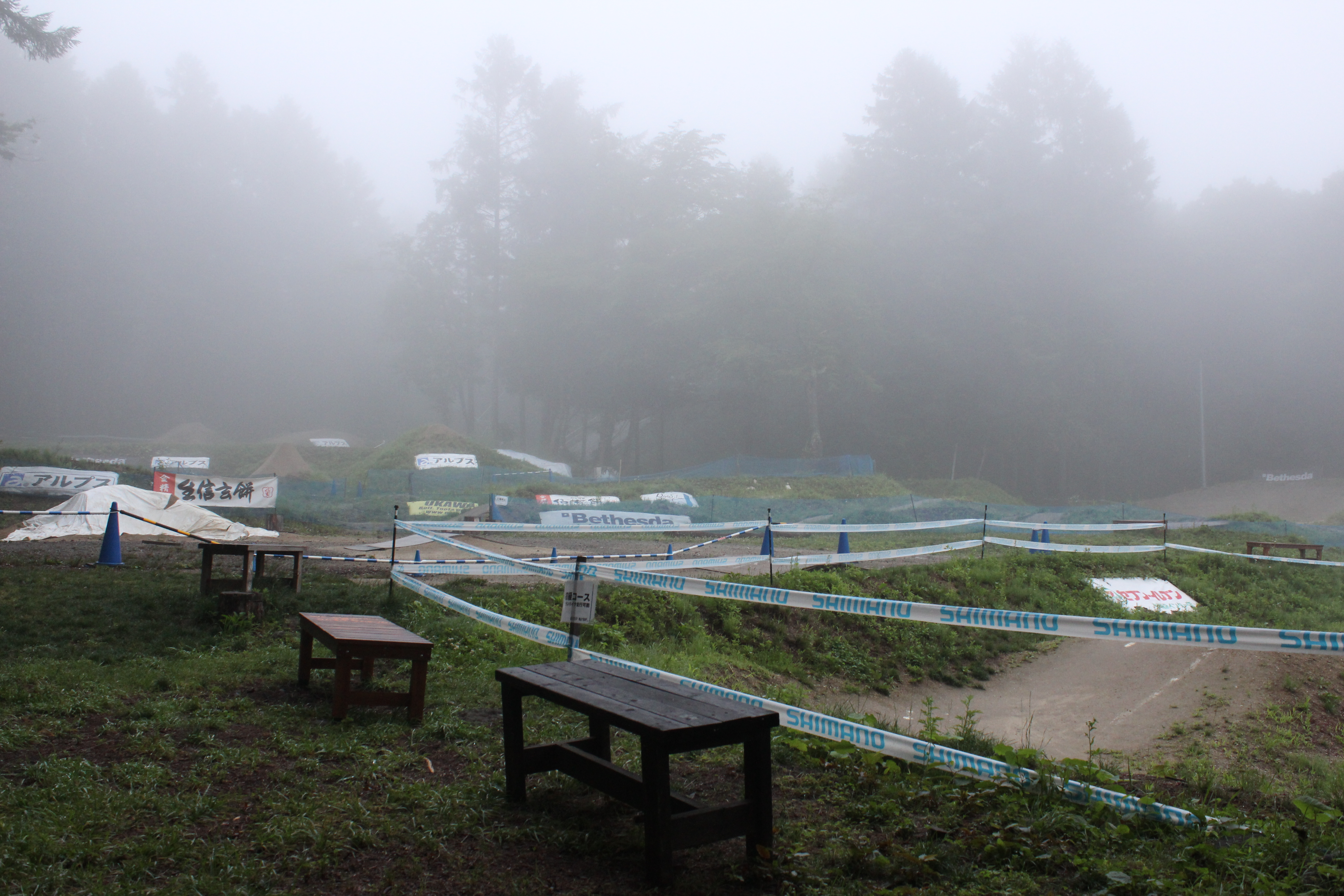 Yuta's Bike Park（ユータズバイクパーク）競技フィールド